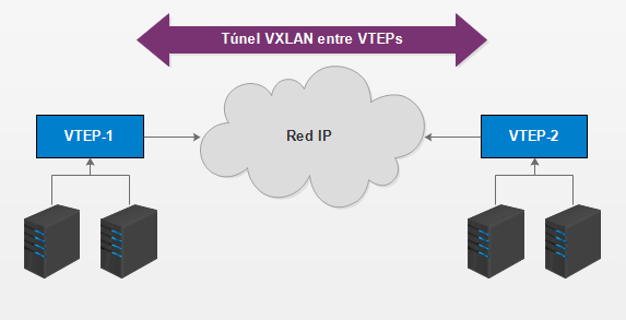 Esquema de red VXLAN